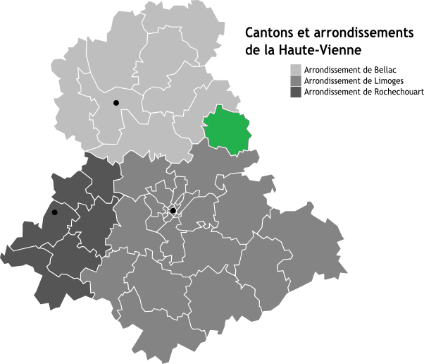 Canton de Laurière, Limousin, France en Carte des arrondissements de la Haute-Vienne